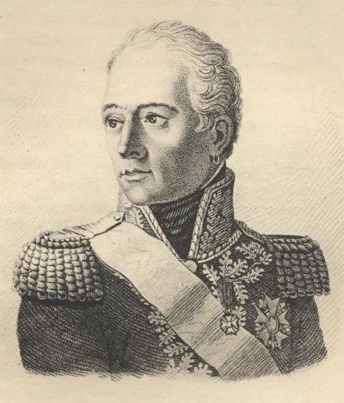 Général_Turreau_Louis_Marie